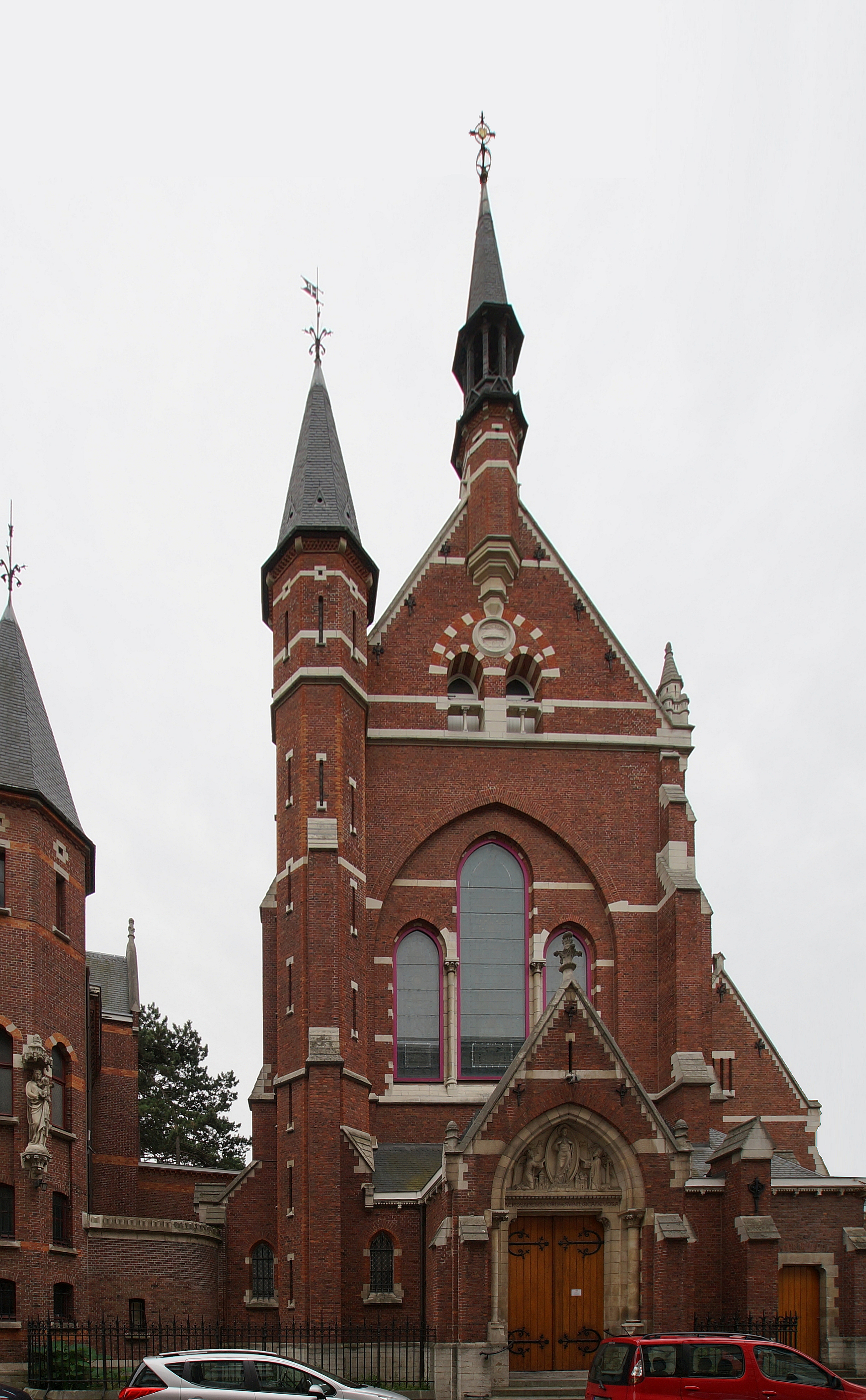 Basiliek van het Heilig Hart te Berchem (Antwerpen) - Gebouwd door Jules Bilmeyer en Joseph van Riel. Erkend als monument (10902). Bewerkt fotomateriaal.